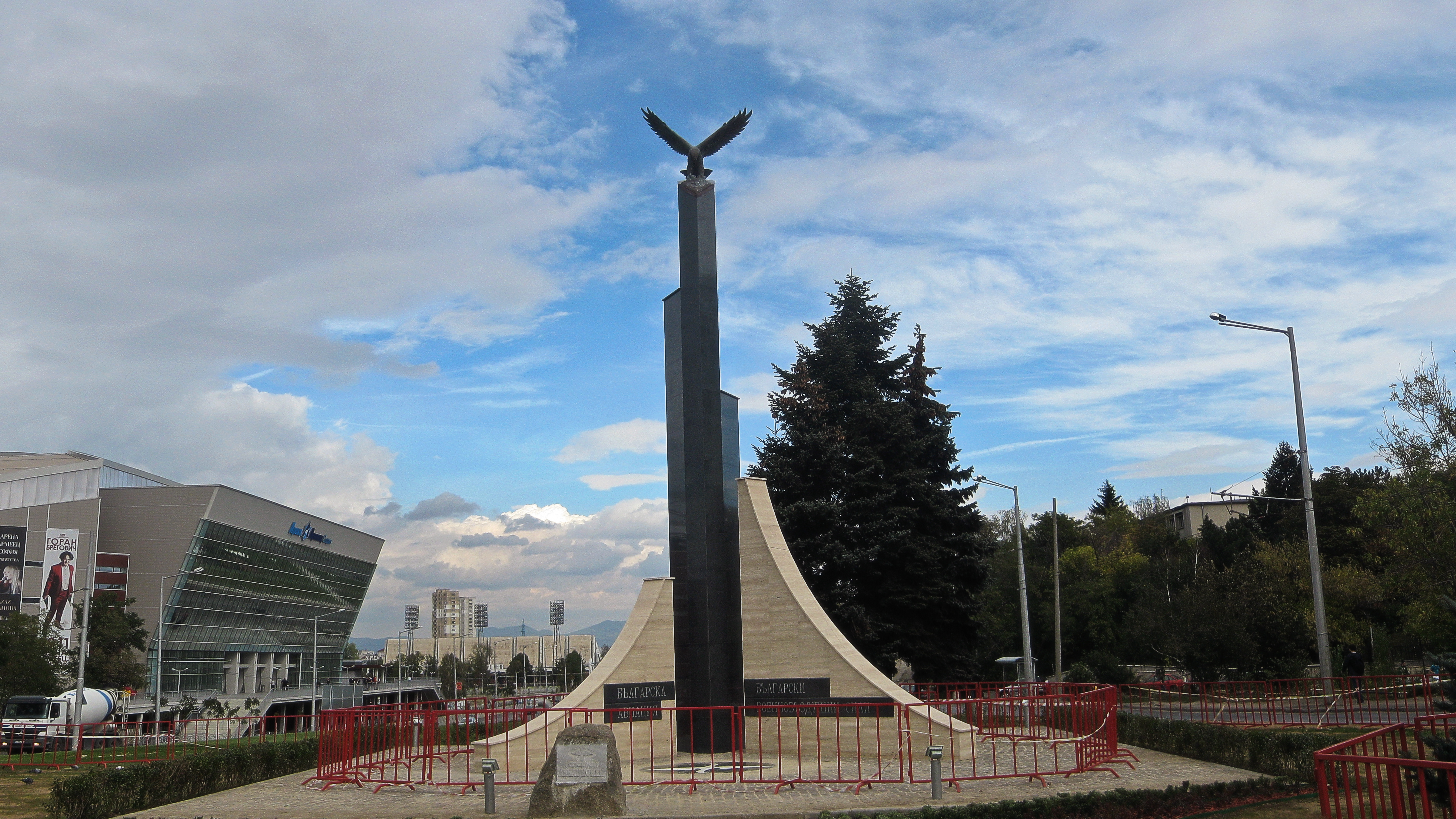 Eagle.jpg